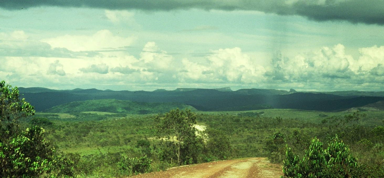 Un ejemplo de relieve invertido de grandes dimensiones, en la Gran Sabana (Venezuela)